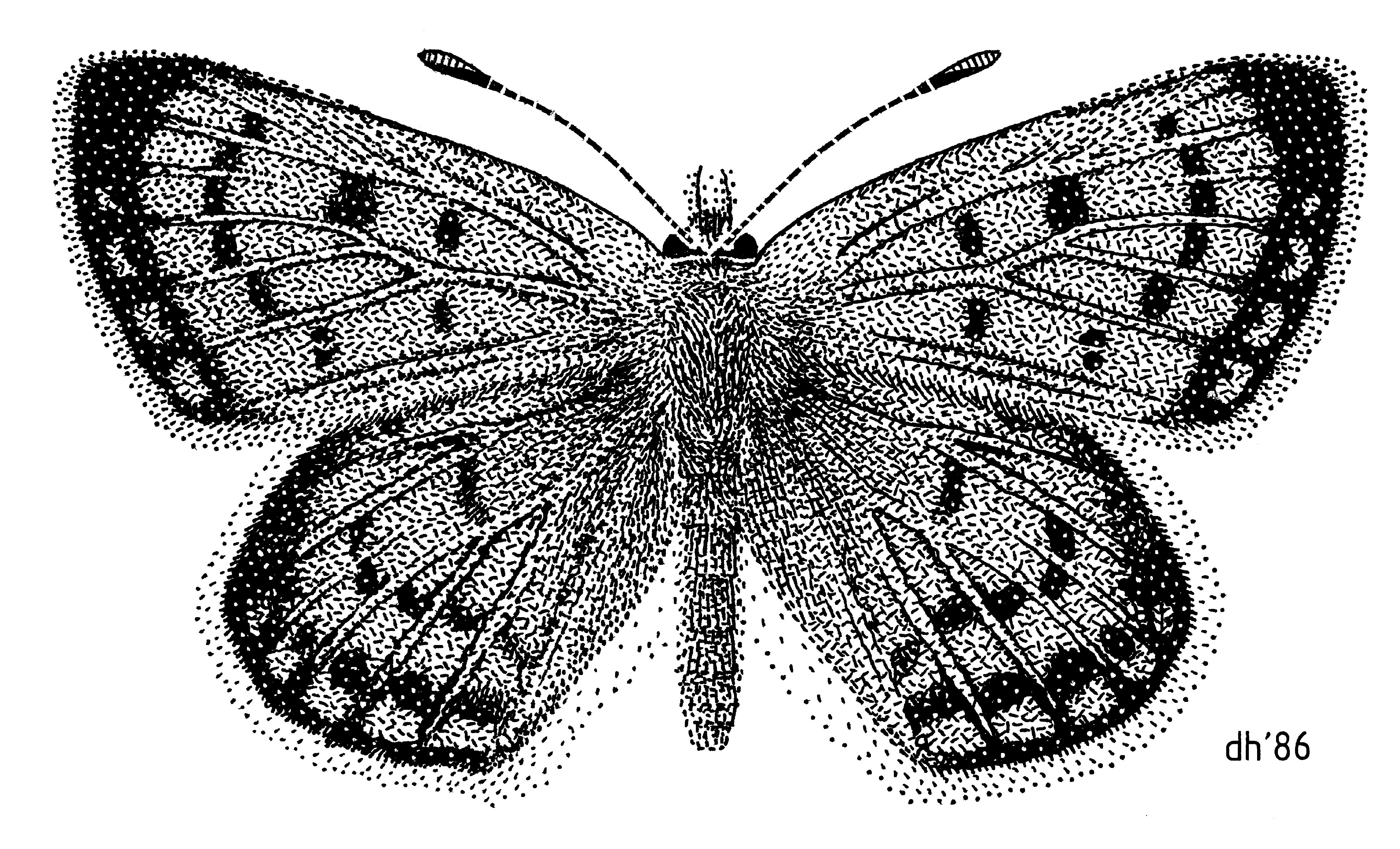 (Lepidoptera: Lycaenidae) Lycaena salustius illustrated by Des Helmore.